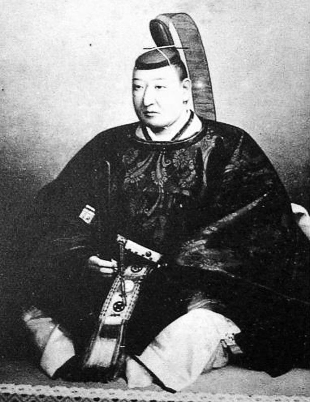 a Japanese man 阿部正弘 (Masahiro Abe)